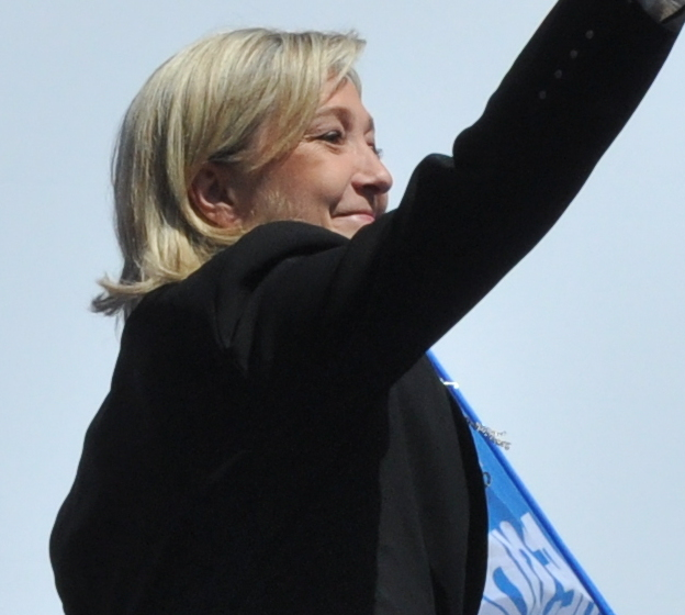 Le 1er mai 2012, comme chaque année, les militants du Front National ont défilé dans Paris et se sont retrouvés devant l'Opéra Garnier pour un meeting. Jean-Marie Le Pen et Marine Le Pen y ont prononcé chacun un discours, en pleine campagne de l'entre-deux tours de la présidentielle. Parmi les attentes, une consigne de vote de la part de la présidente du FN, qui n'en a pas donnée et a annoncé voter blanc à titre personnel.